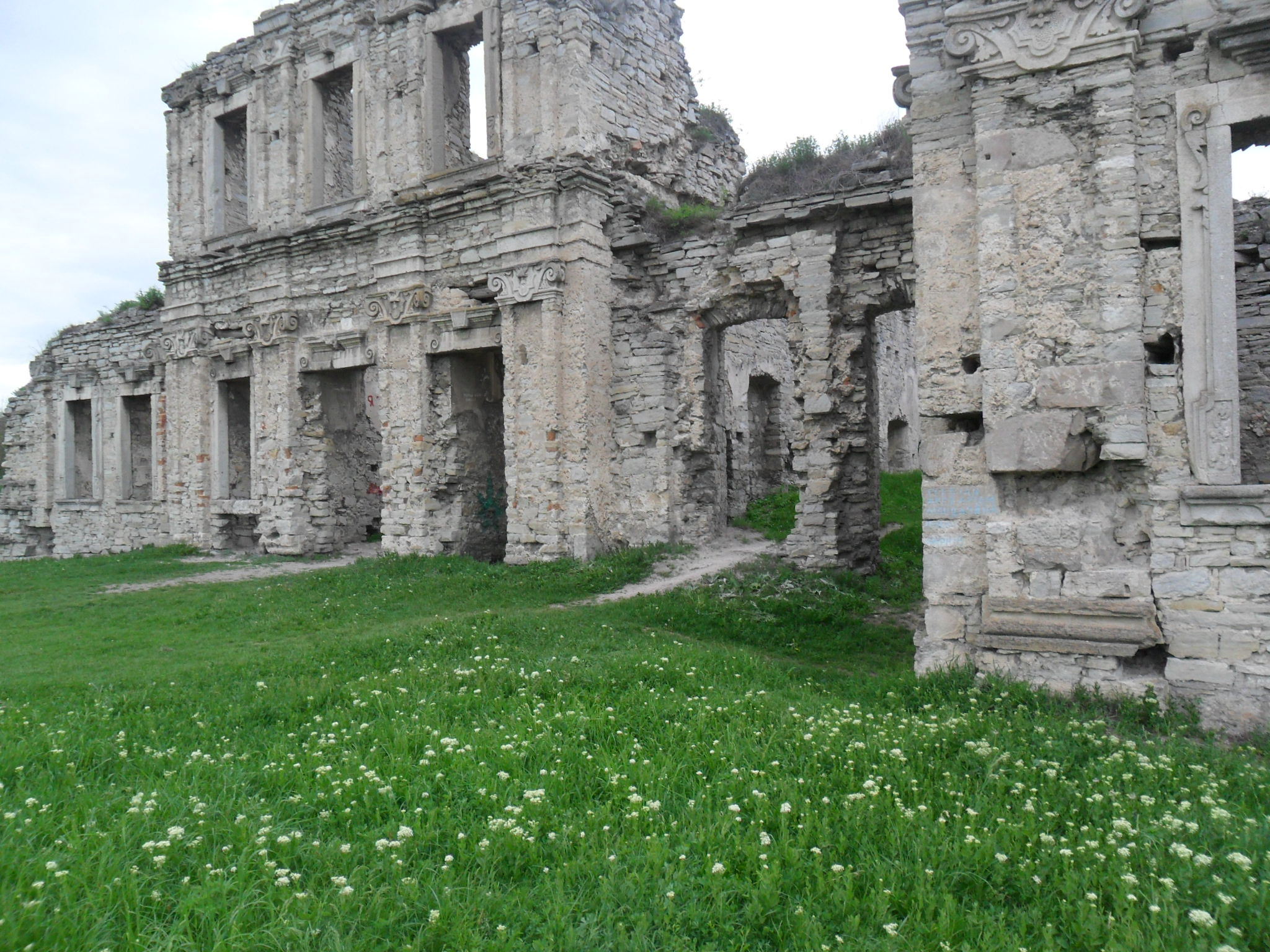 Замок в Скале-Подольской